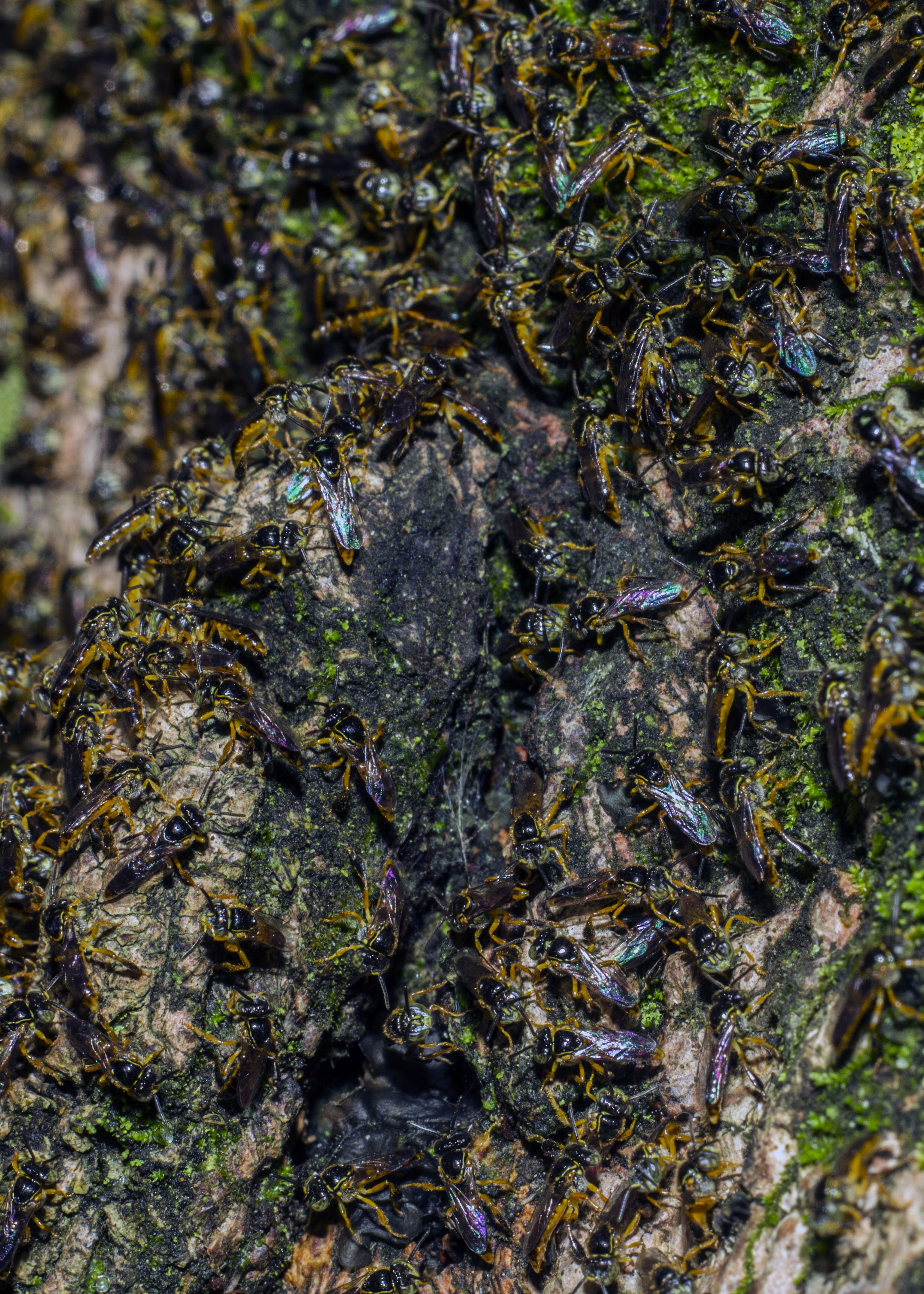 Machos de jataí (Tetragonisca Angustula) nas proximidades da nova colmeia aguardam a chegada da princesa para realizar o vôo nupcial.